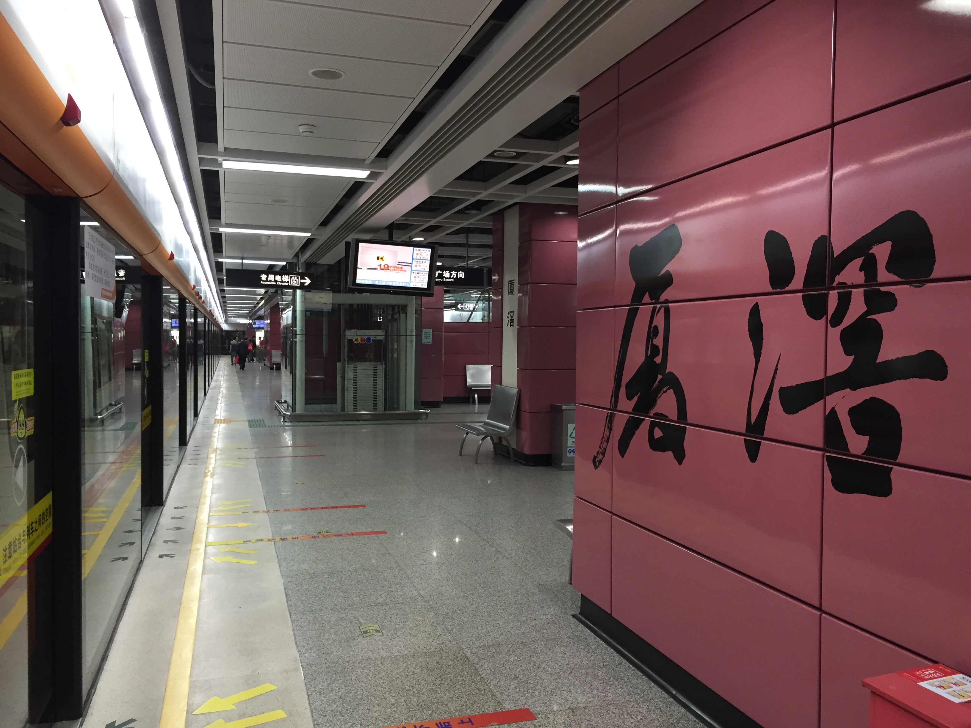 广州地铁厦滘站